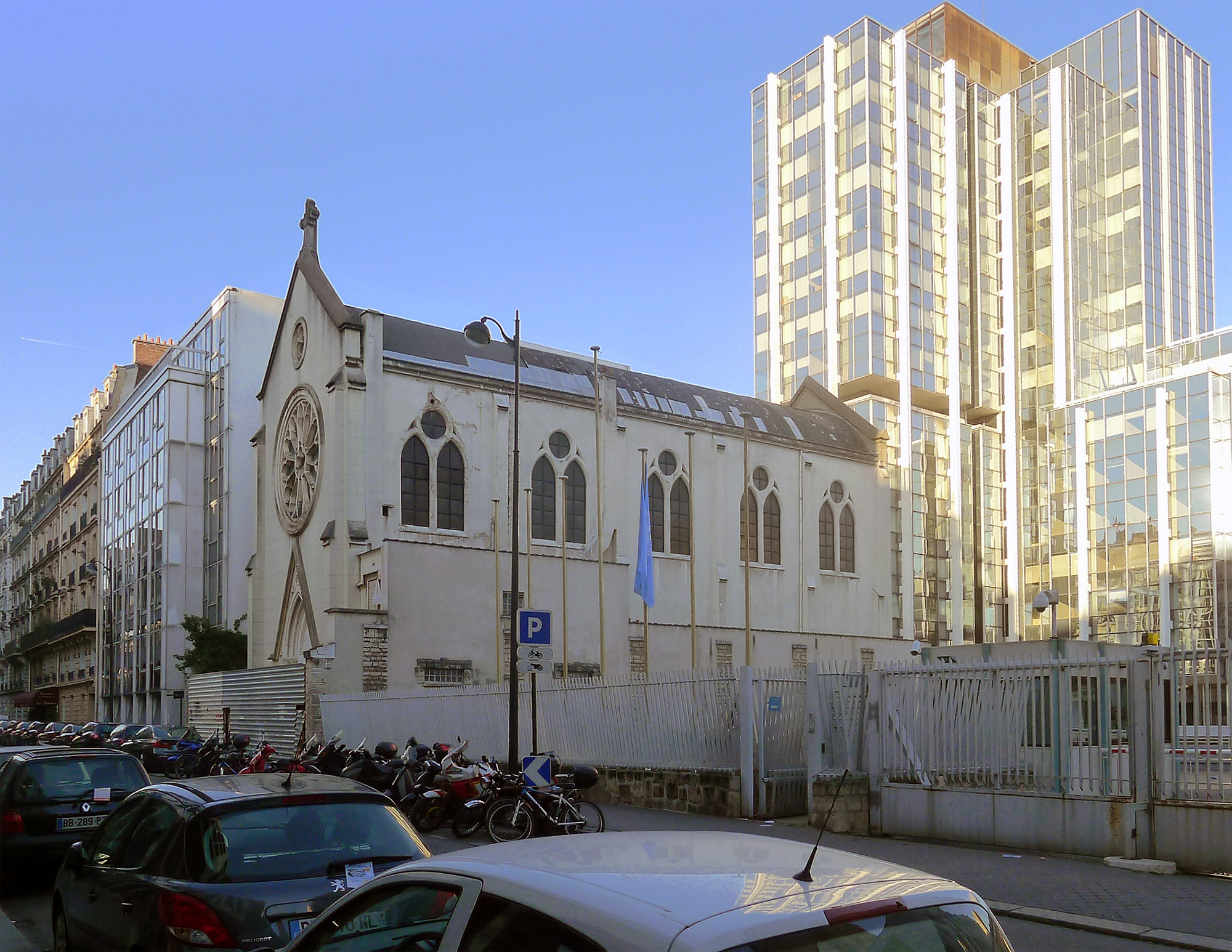 Rue François-Bonvin (église Sainte-Rita) - Paris 15